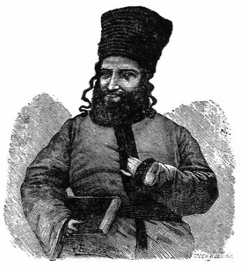 מהר"ץ חיות